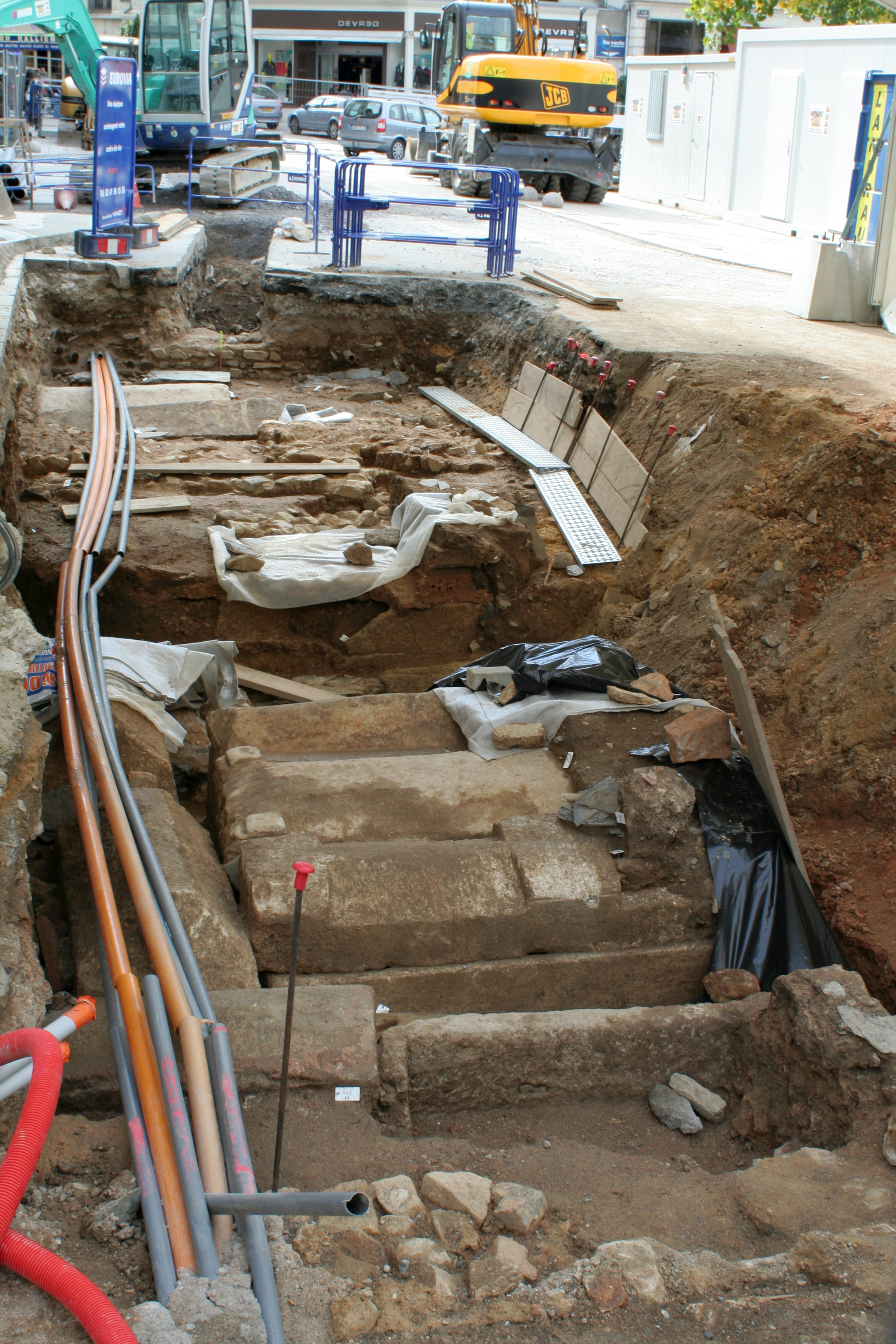 Fouilles archéologiques place du Ralliement à Angers : sarcophages mérovingiens découverts lors des travaux du tramway.